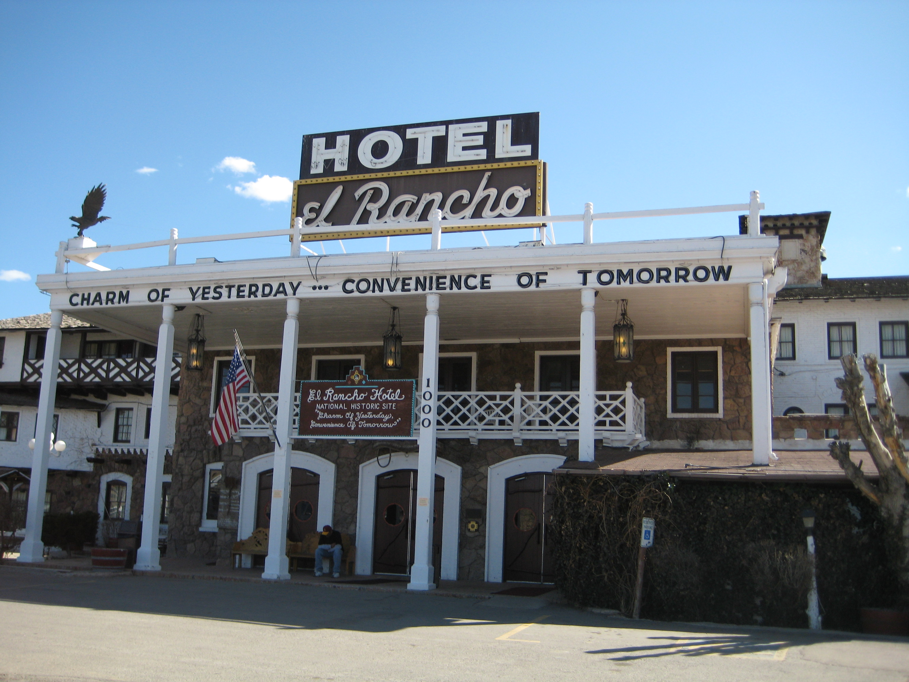 El Rancho Hotel & Motel